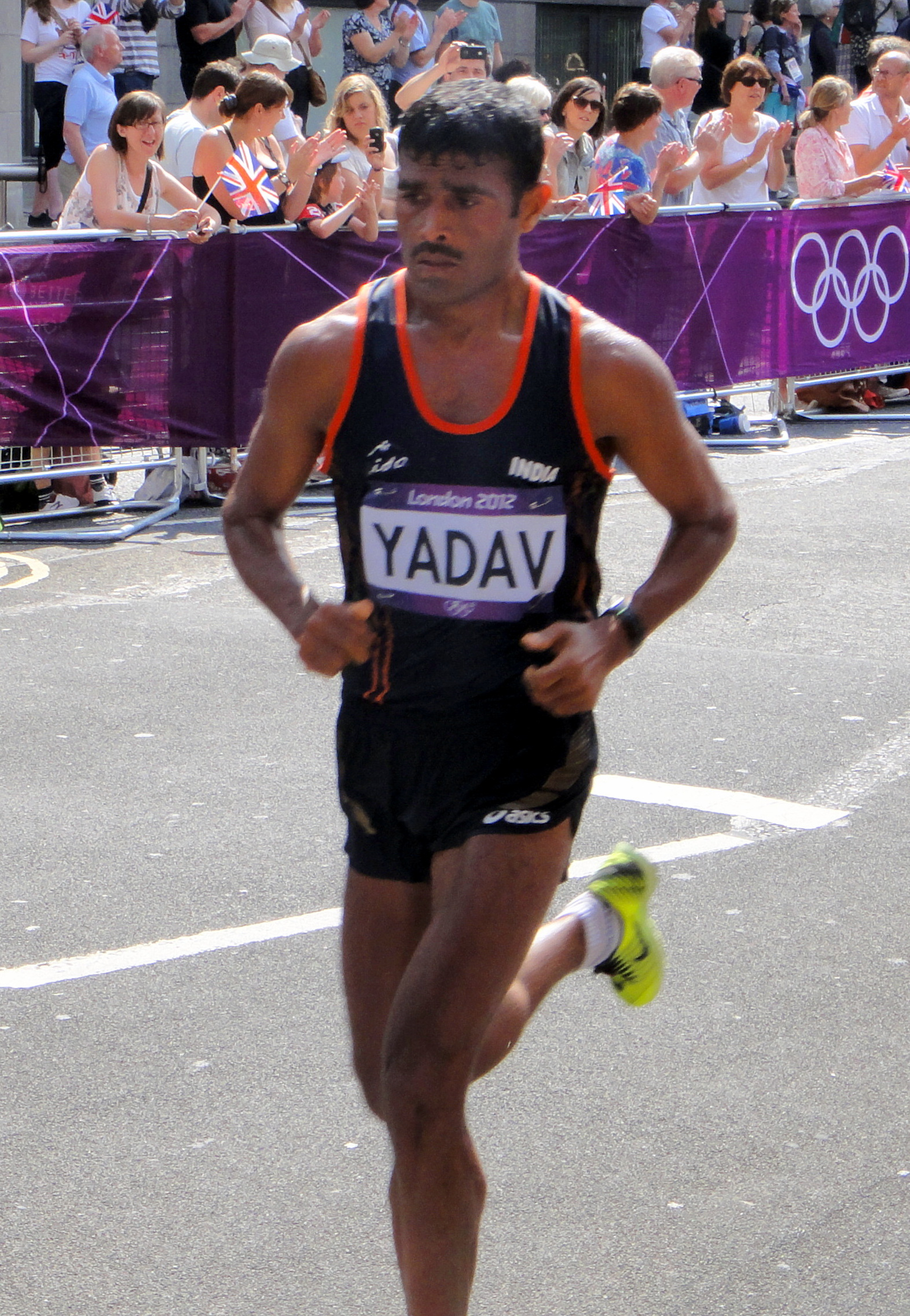 Ram Singh Yadav (India) & Sinkweon Jang (Korea) - London 2012 Men's Marathon